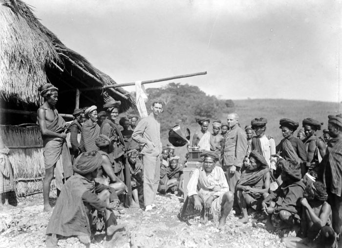 Negatief. De vorsten van Soemba waren er beter dan die van Timor in geslaagd om de VOC buiten de deur te houden, onder meer door te beweren dat het kappen van sandelhout (Soemba werd ook Sandelhouteiland genoemd) op religieuze bezwaren stuitte. In de 20e eeuw werd het echter lastiger om de koloniale staat te weren. De foto laat zien hoe 'de staat' goede sier maakte met 'de moderne technologie'. De afbeelding illustreert ook mooi de verschillen in 'modernisering' binnen de Archipel: terwijl de Soembanezen gefascineerd rond de platenspeler dromden, hadden de Javaanse arbeiders die in vaste dienst waren van een suikerfabriek zo'n ding al in huis. (P. Boomgaard, 2001). Grammofoonvoorstelling voor het bivak Kamboe Hapang bij Lewapakoe, Soemba